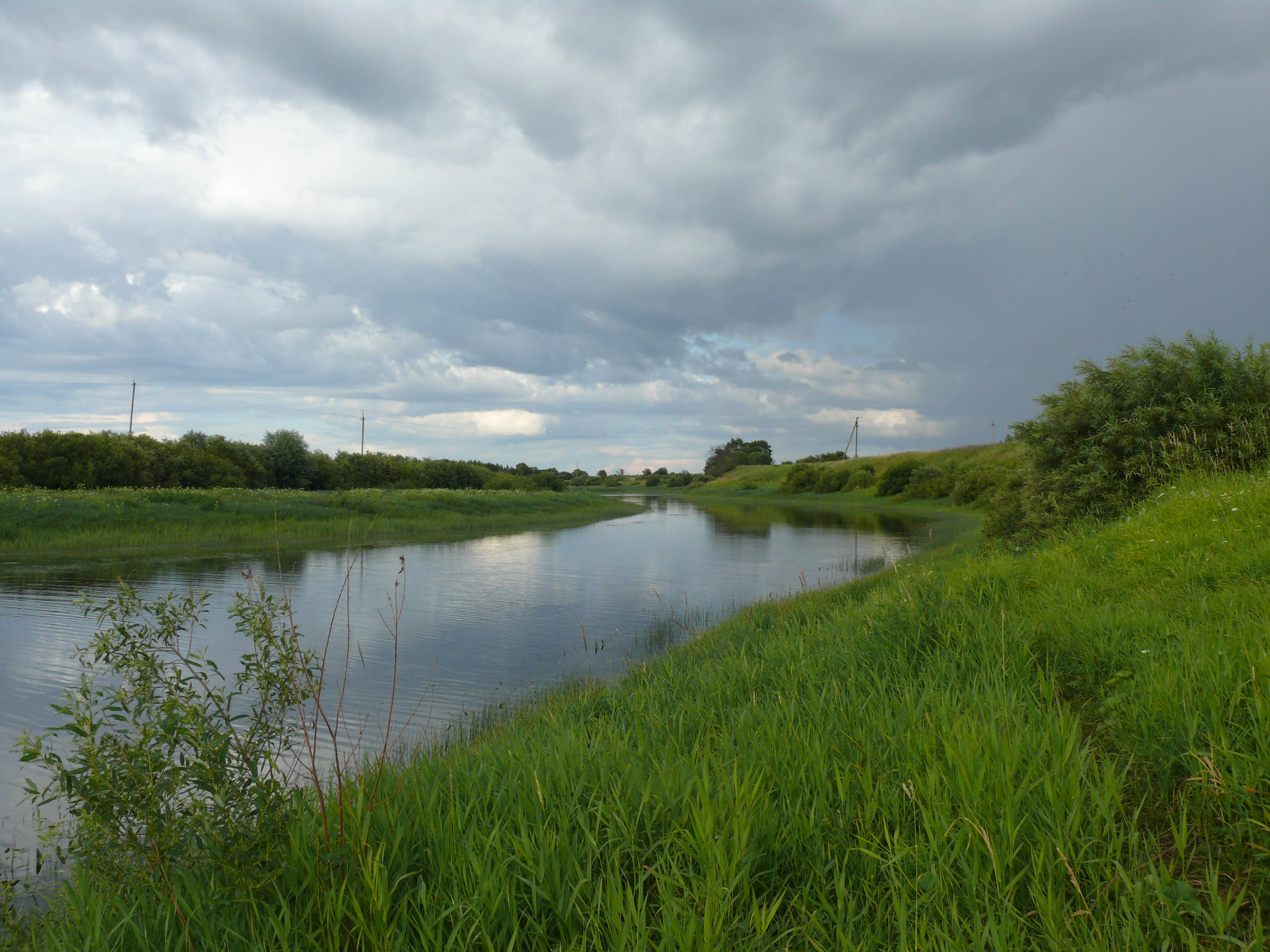 Струпенка - приток Шелони. Шимский район Новгородской области